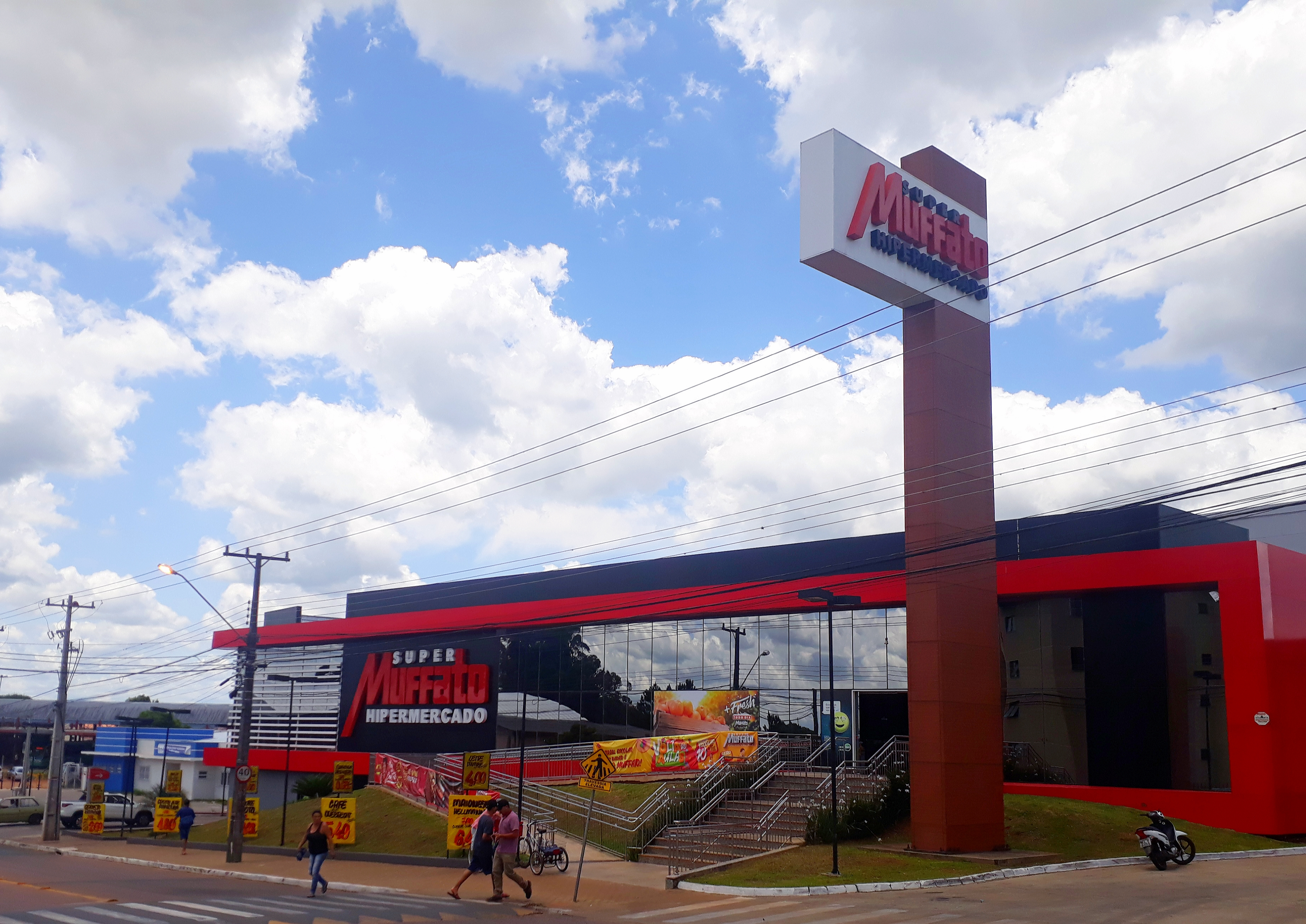 Super Muffato Hipermercado de Uvaranas, em Ponta Grossa, no Paraná.